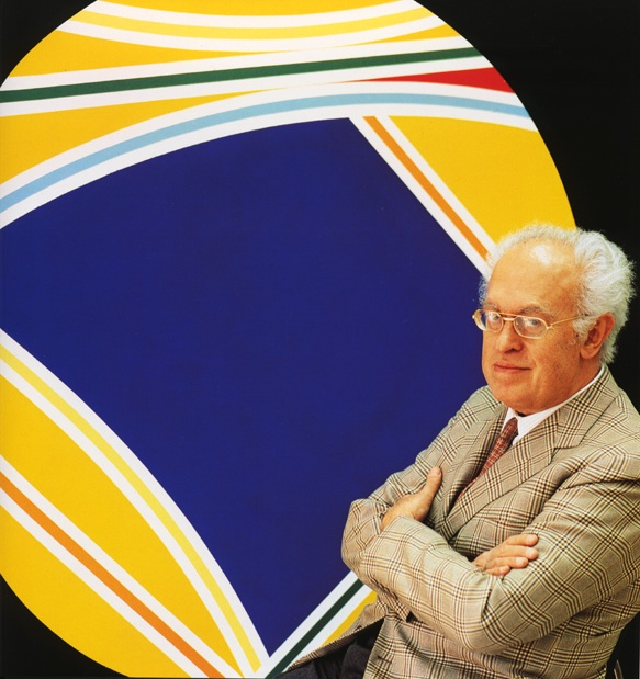 Nino Di Salvatore davanti a una sua opera